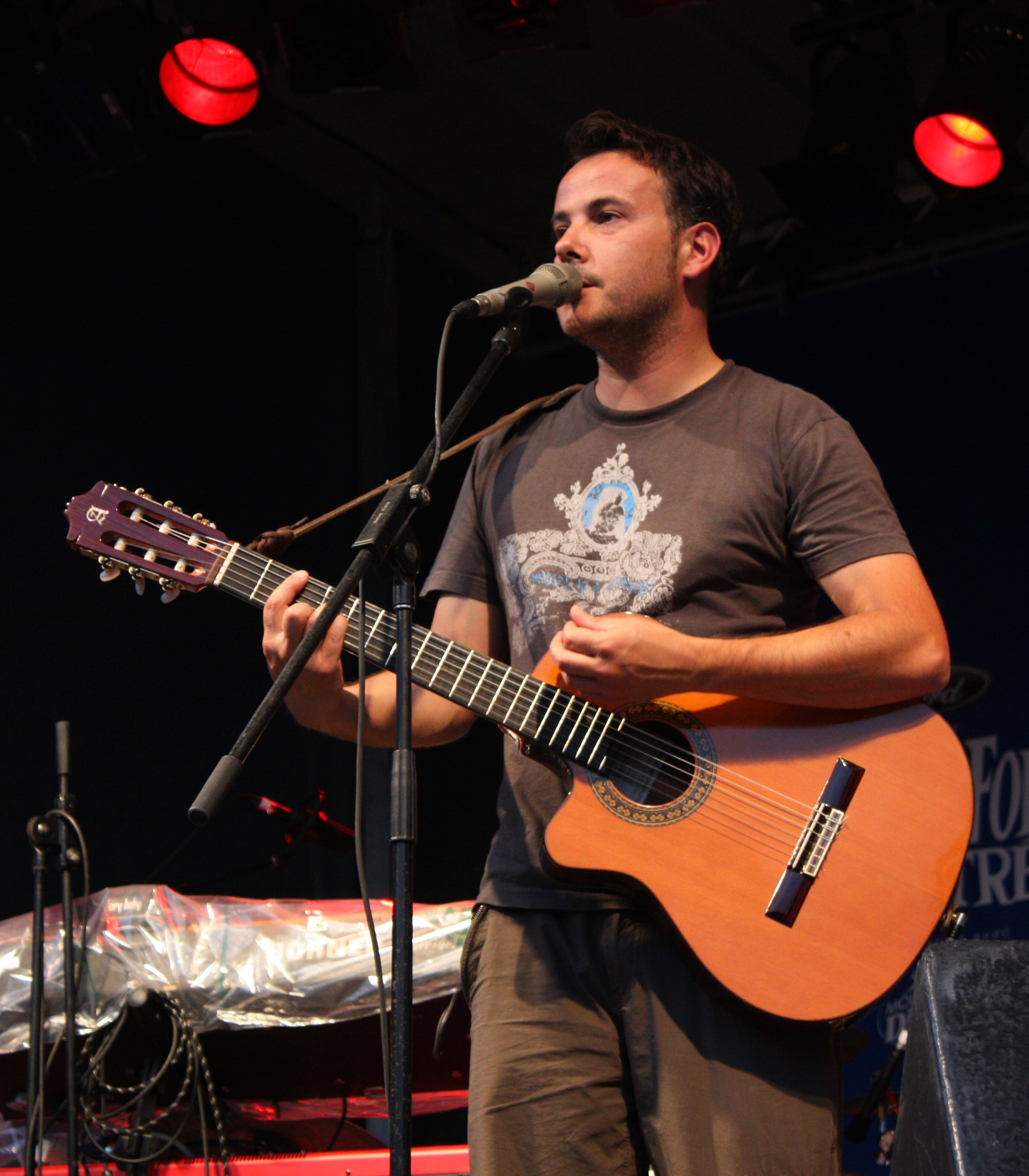 Mickaël Furnon (Mick est tout seul) aux FrancoFolies de Montréal en juillet 2008.